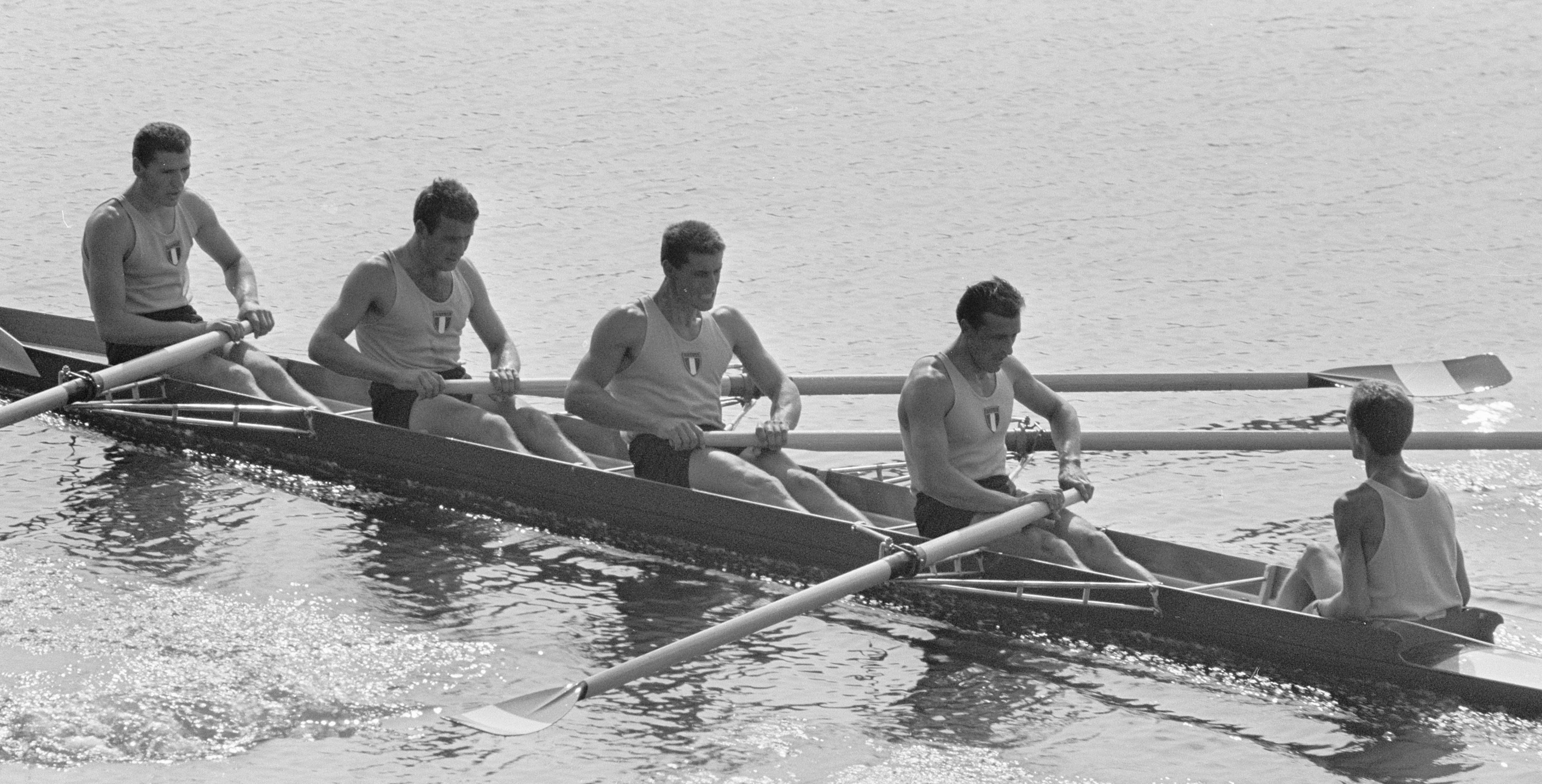 Europese roeikampioenschappen op de Bosbaan, training Italie 4 met stuurman